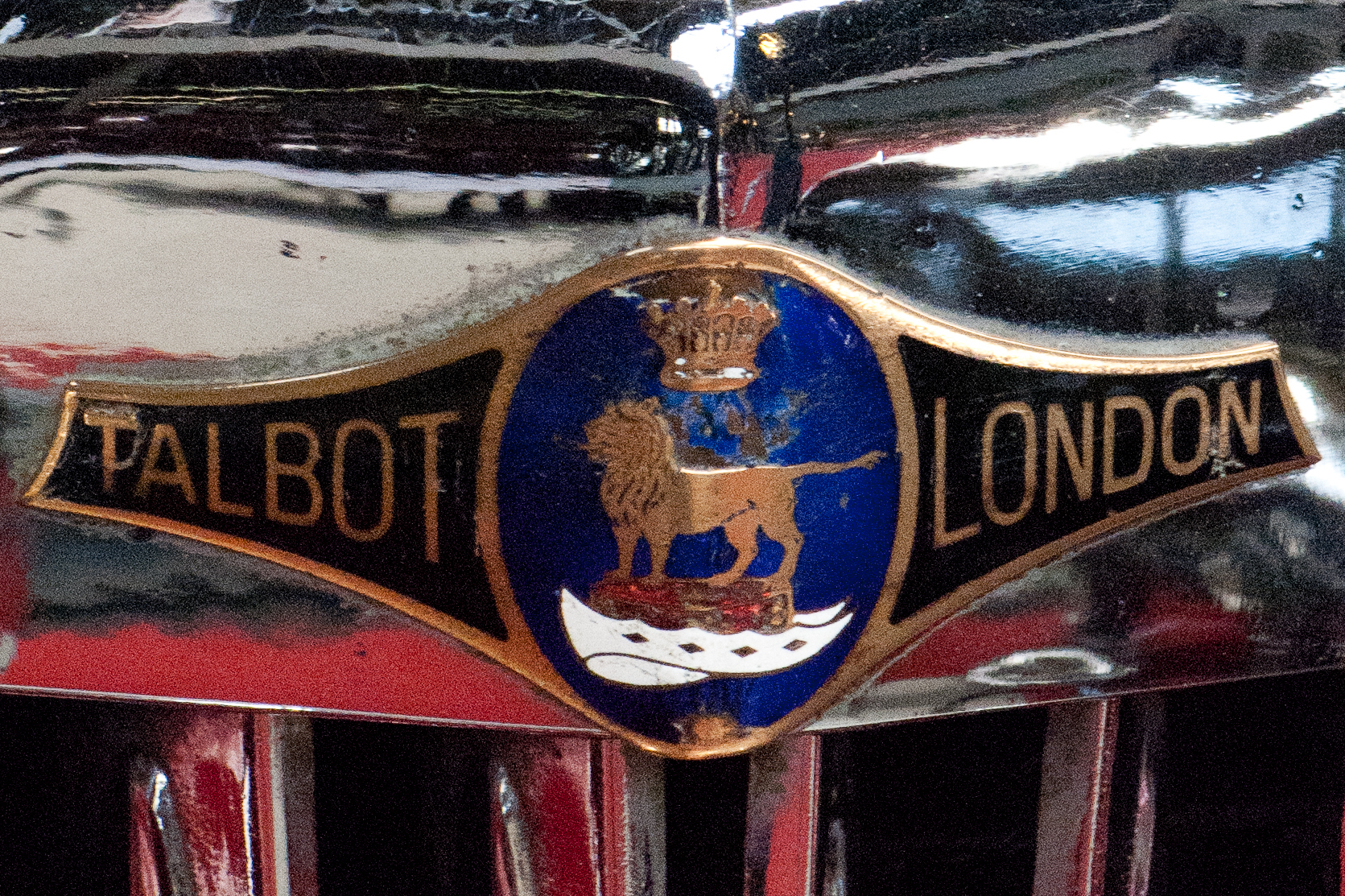 Brussels, Belgium, 2011